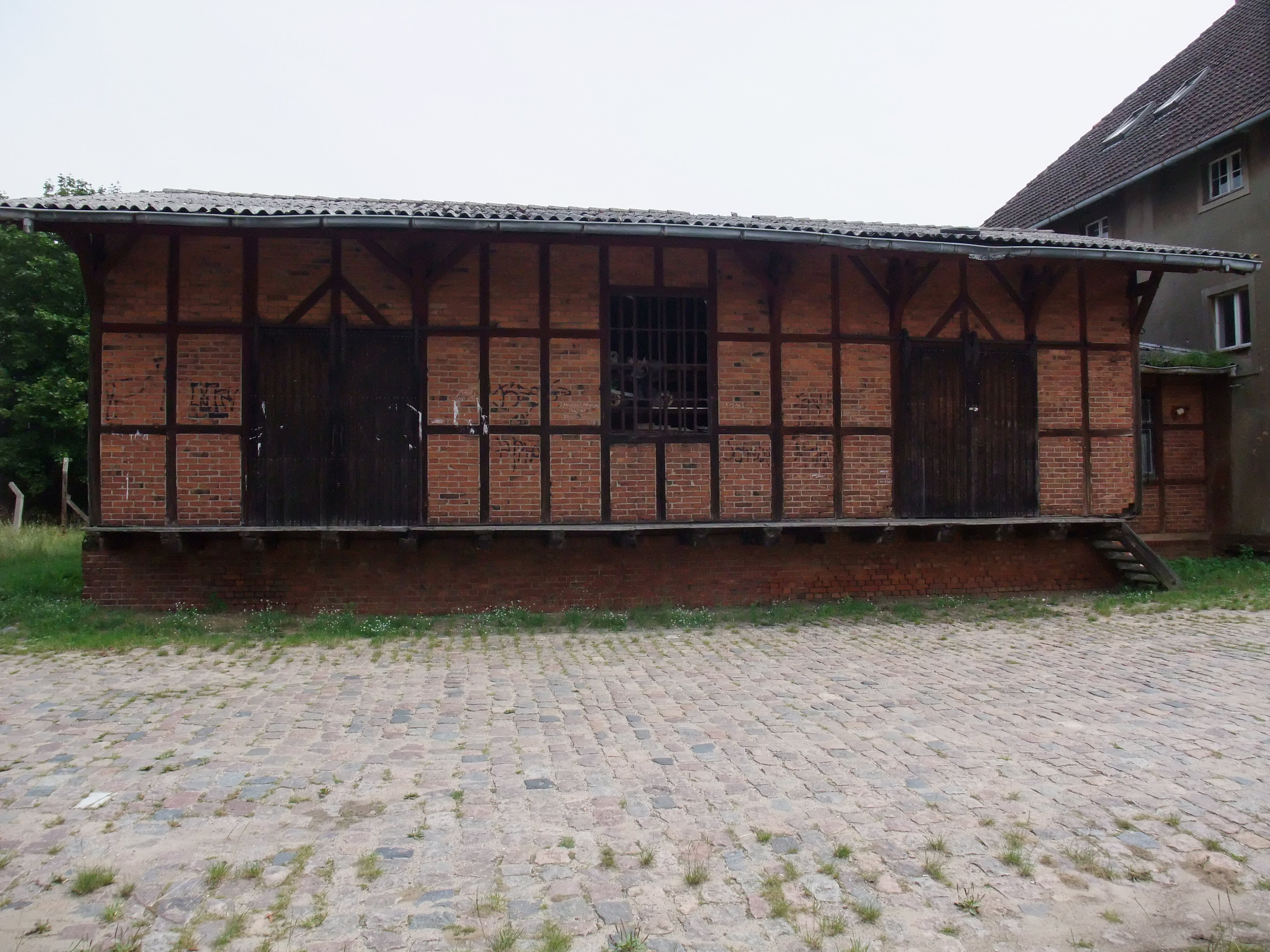 Alter Bahnhof (Güterbahnhof) in Gartz (Oder), Brandenburg